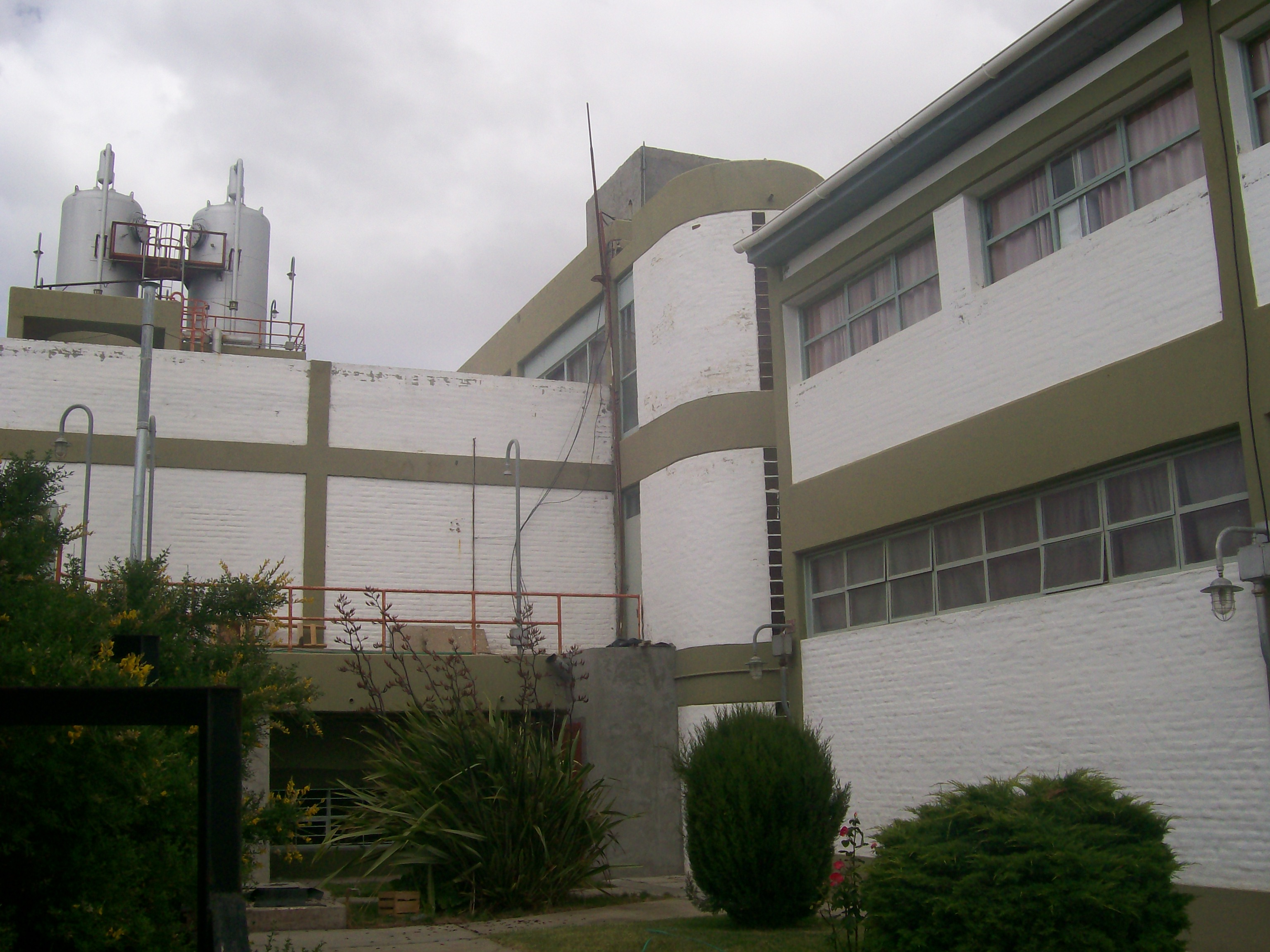 dentro del complejo UNPA